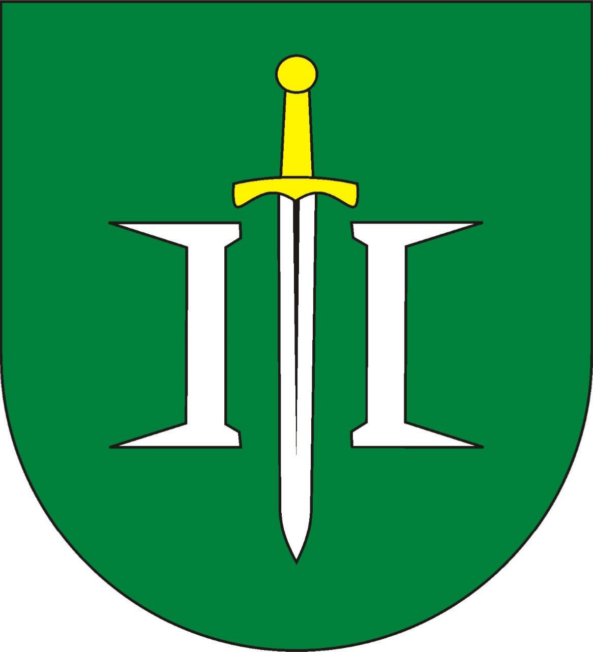 Herb gminy Medyka